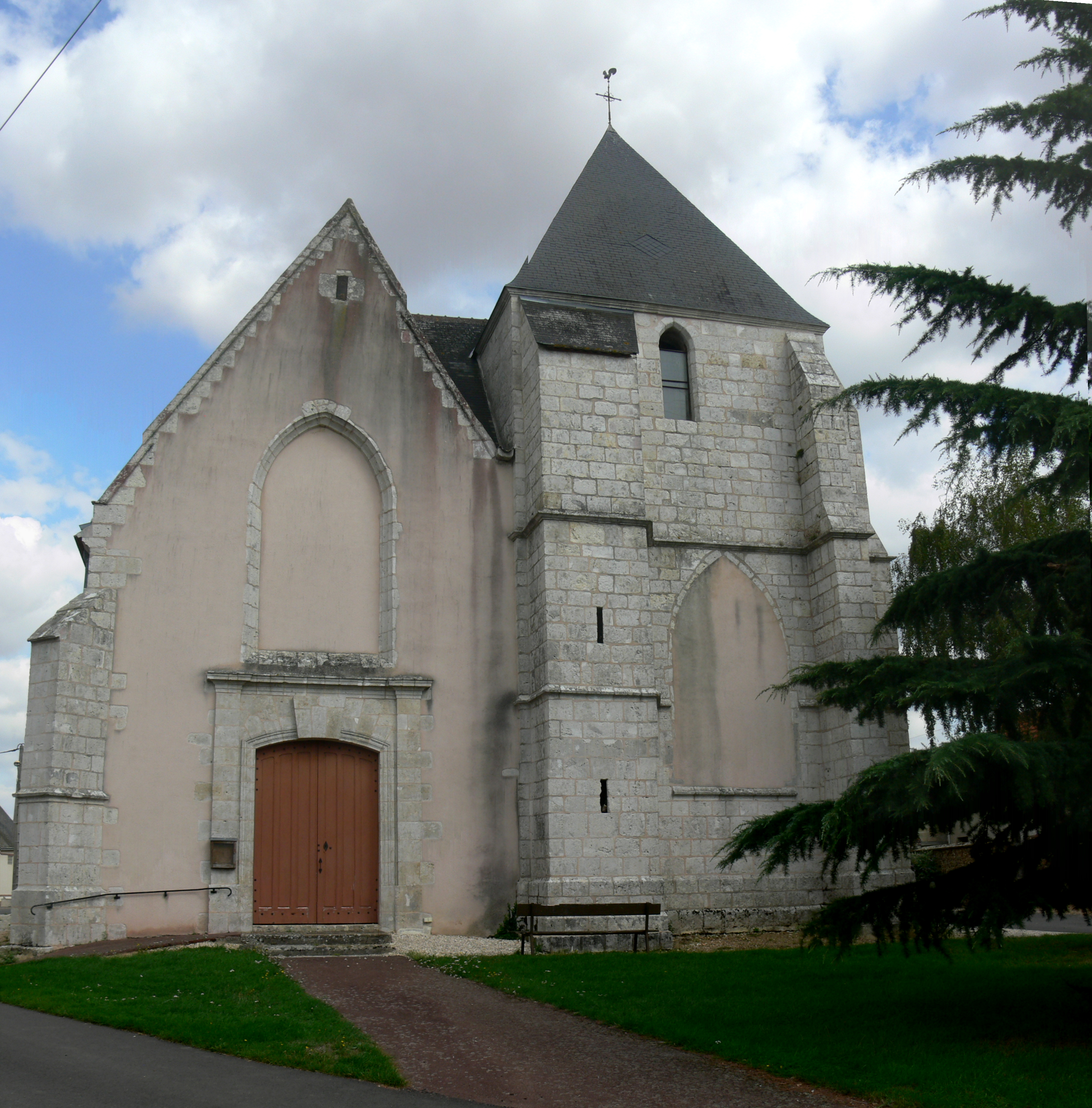 église Saint-Georges, Luplanté, Eure-et-Loir, France.